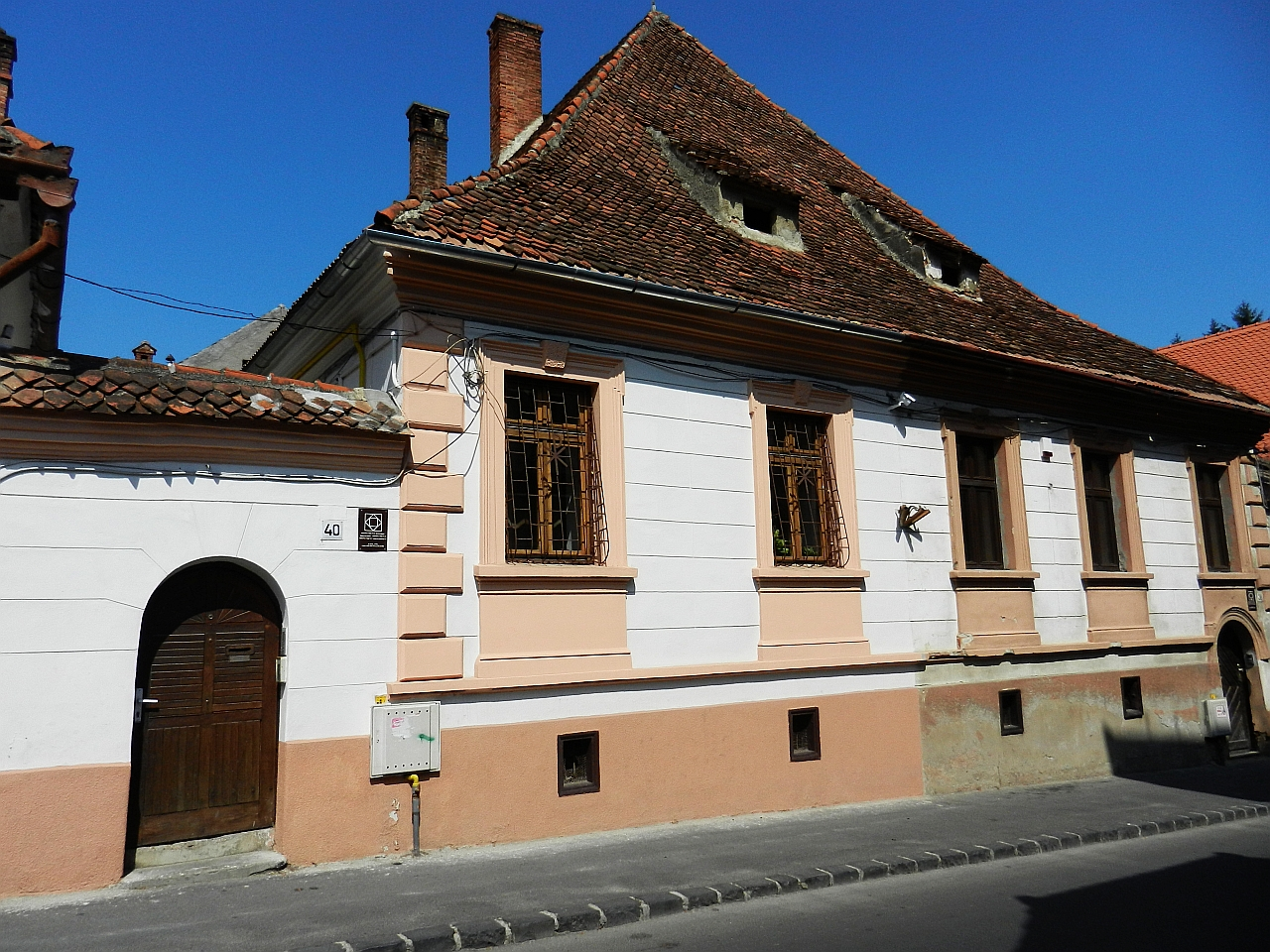 Casă monument